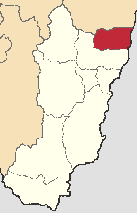 Mapa localizador del cantón en Zamora Chinchipe, Ecuador